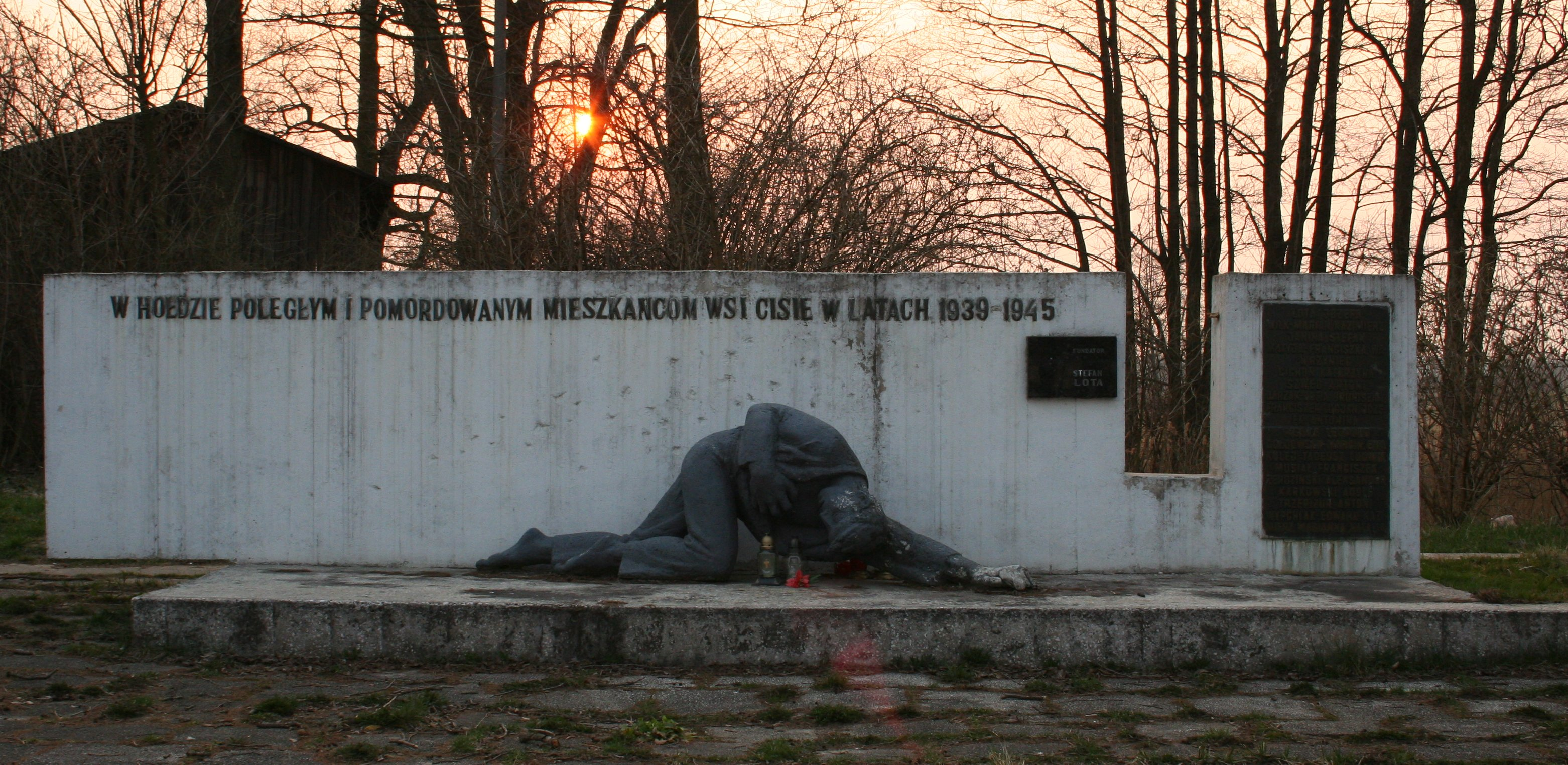 Pomnik poświęcony pomordowanym mieszkańcom miejscowości Cisie, gmina Blachownia, powiat kłobucki, województwo śląskie